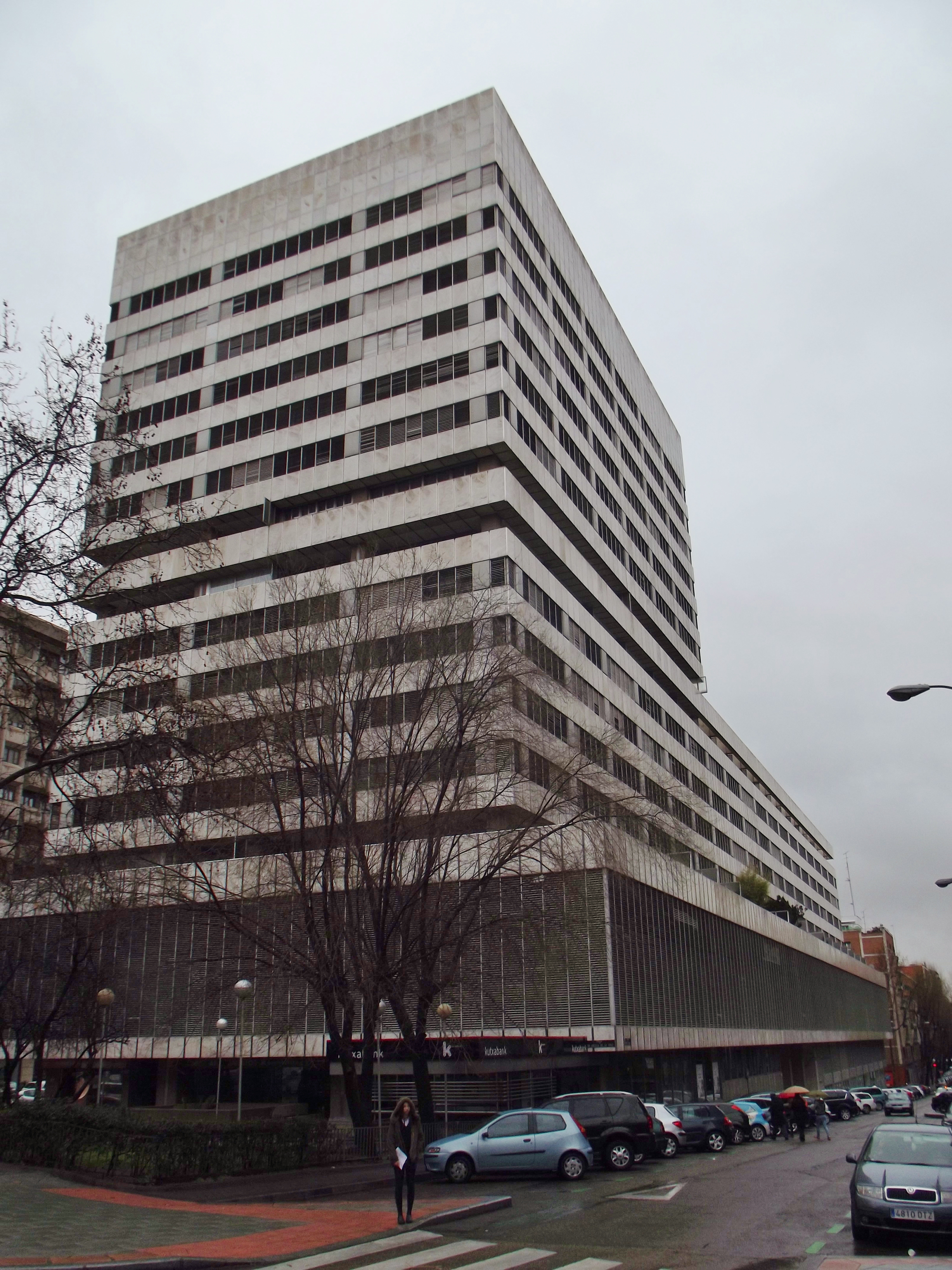 Edificio Eurobuilding 2, Madrid. Arquitecto: Eleuterio Población Knappe. Proyectado en 1979. Online database: COAM.